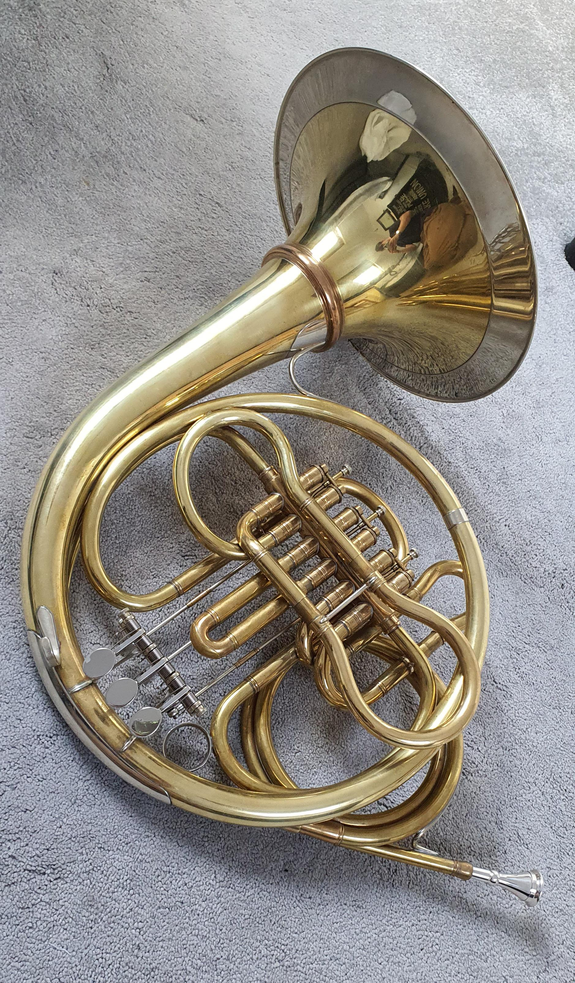 Horn with Pumpenvalves